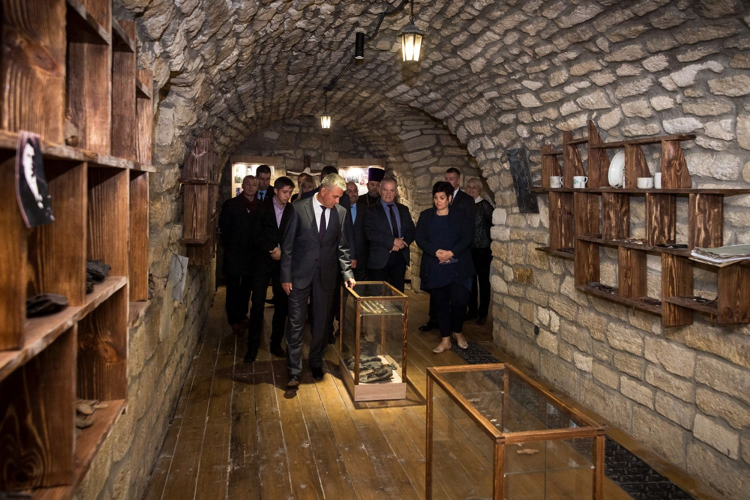 Вадим Красносельский в музее жертв политических репрессий на территории Тираспольской крепости